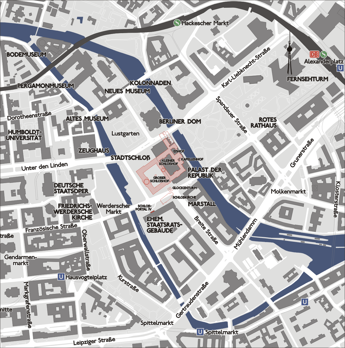 Lageplan des ehemaligen Berliner Stadtschlosses im heutigen Stadtgrundriss. In Rosa mit rotem Umriss Kubatur ca. 1930, südlich Schloßkirche und Glockenturm abgerissen 1750, nördlich der im Zuge des Straßenausbaus vor 1930 abgerissene Lustgartenflügel.